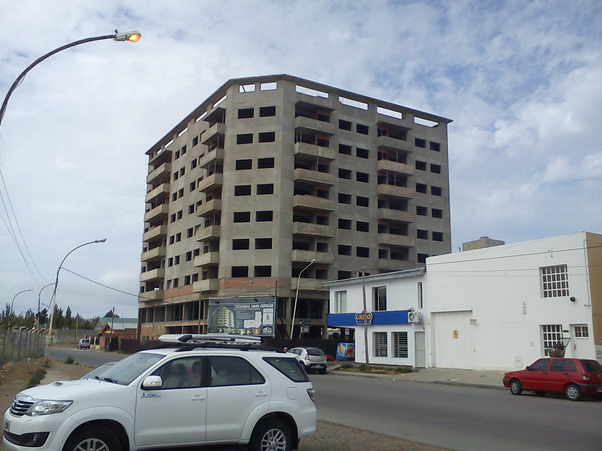 Vista al Cortazar Tower